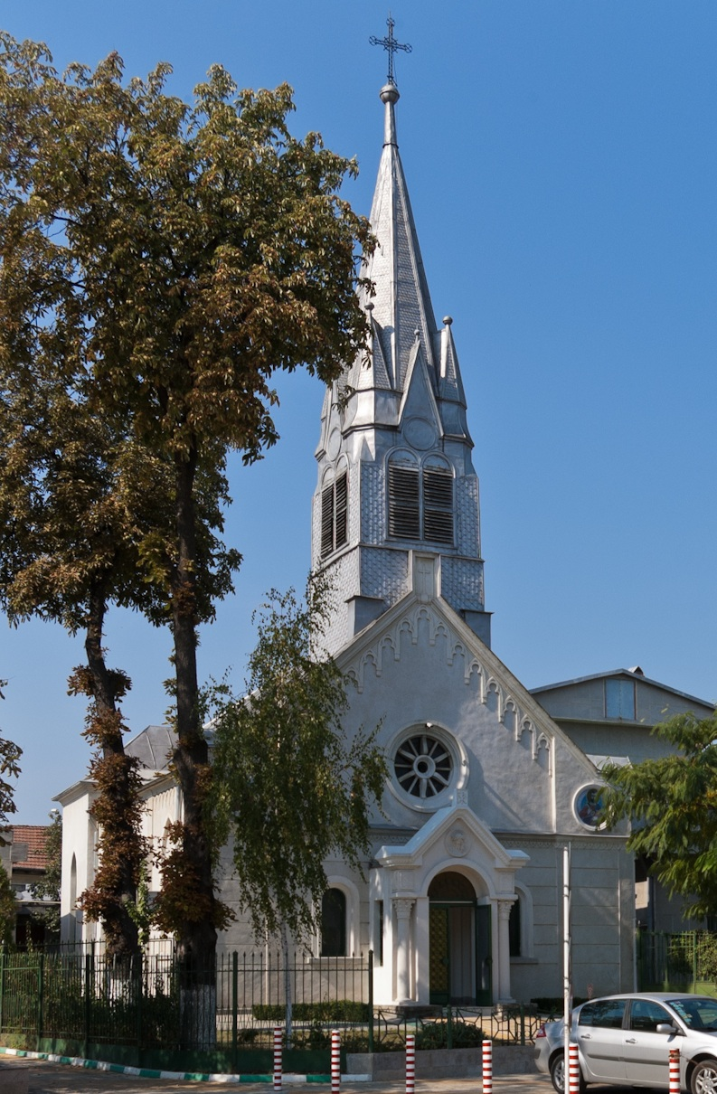 Fotografia prezinta Biserica catolică "Sf. Petru şi Pavel" din Pitesti vazuta dinspre E.